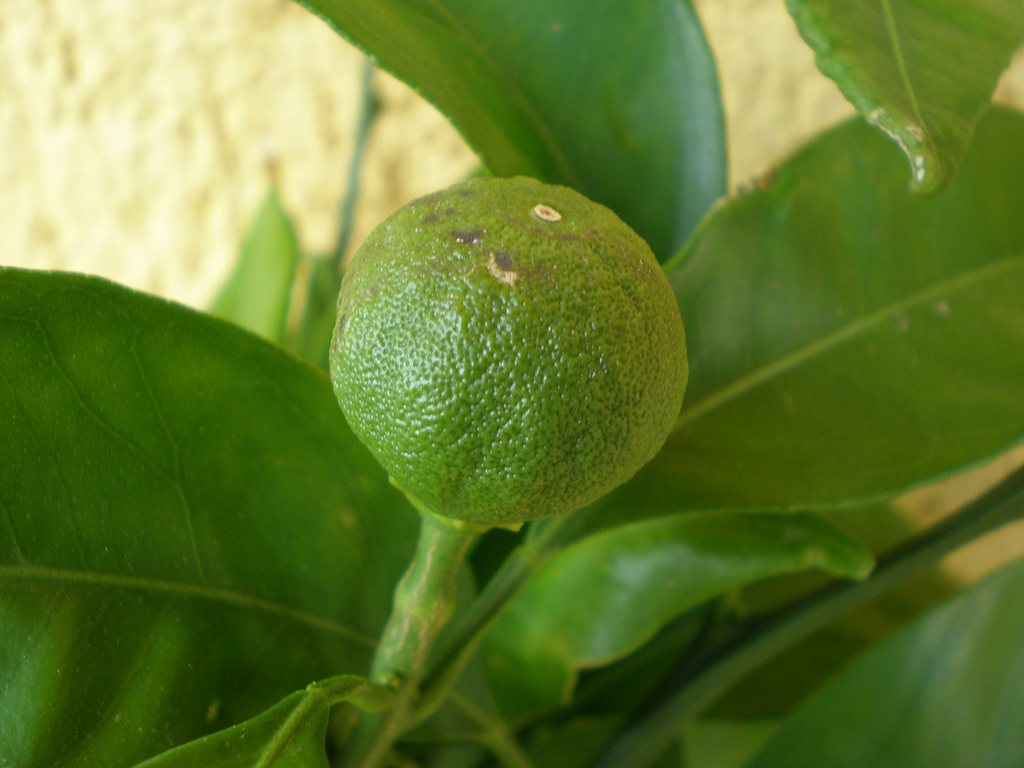 Little mandarine